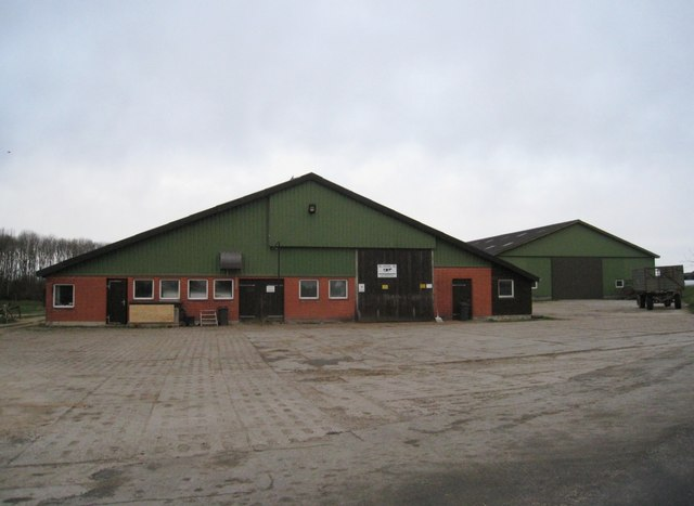 Landwirtschaftsgebäude - Grieben